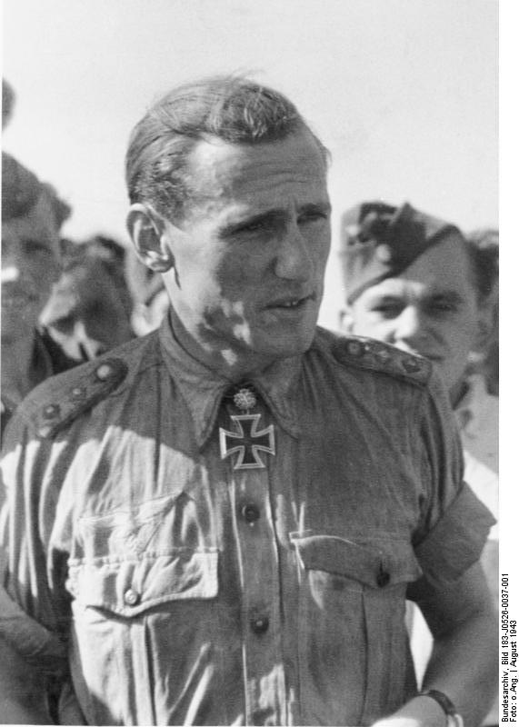 Günther Rall Zentralbild/26.5.1970/Frankfurt Main/ Nazioffizier soll auf hohen Bundeswehrposten Hunderte deutsche Soldaten schickte dieser Mann während des II. Weltkrieges in den sicheren Tod; mit seinen Flugzeugen bombardierte er Städte und Dörfer und mordete ungezählte Menschenleben - sein Name ist Günther Rall. Der ehemalige Nazioffizier und jetzige Bundeswehr-Generalmajor ist Träger höchster Nazi-Auszeichnungen, so des Eichenlaubs mit Schwertern zum Ritterkreuz. Rall soll Nachfolger des Inspekteurs der Luftwaffe, Steinhoff, werden. Zur Zeit befehligt er die 4. Alliierte taktische Luftflotte. Aufnahme August 1943 Abgebildete Personen: Rall, Günther: Major, Ritterkreuz (RK), Luftwaffe, Generalleutnant, Inspekteur der Bundesluftwaffe, Bundesrepublik Deutschland (PND 124275990)